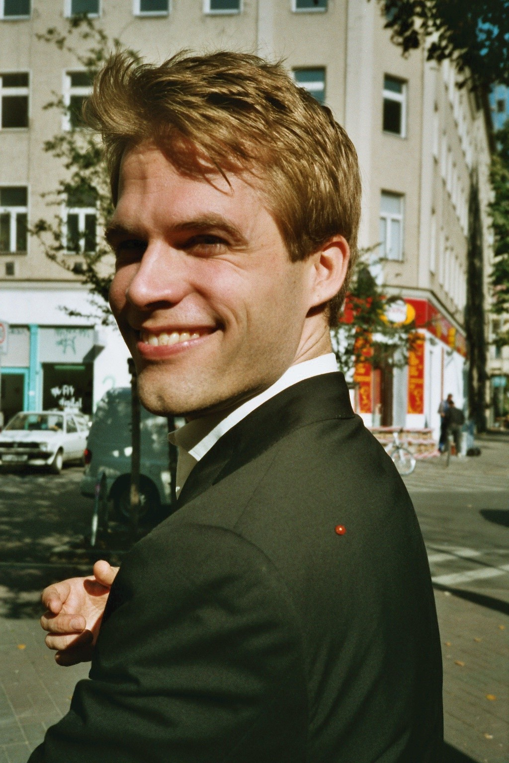 Bas Kast in Berlin